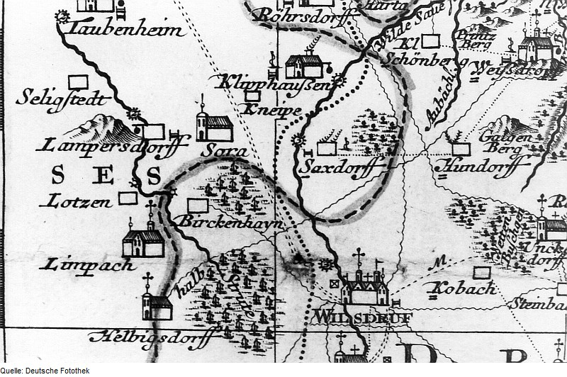 Original image description from the Deutsche Fotothek Klipphausen-Sachsdorf. Seutter, Kirchenkreis Dresden, Mitte 18. Jh. (Sign.: VII 43)